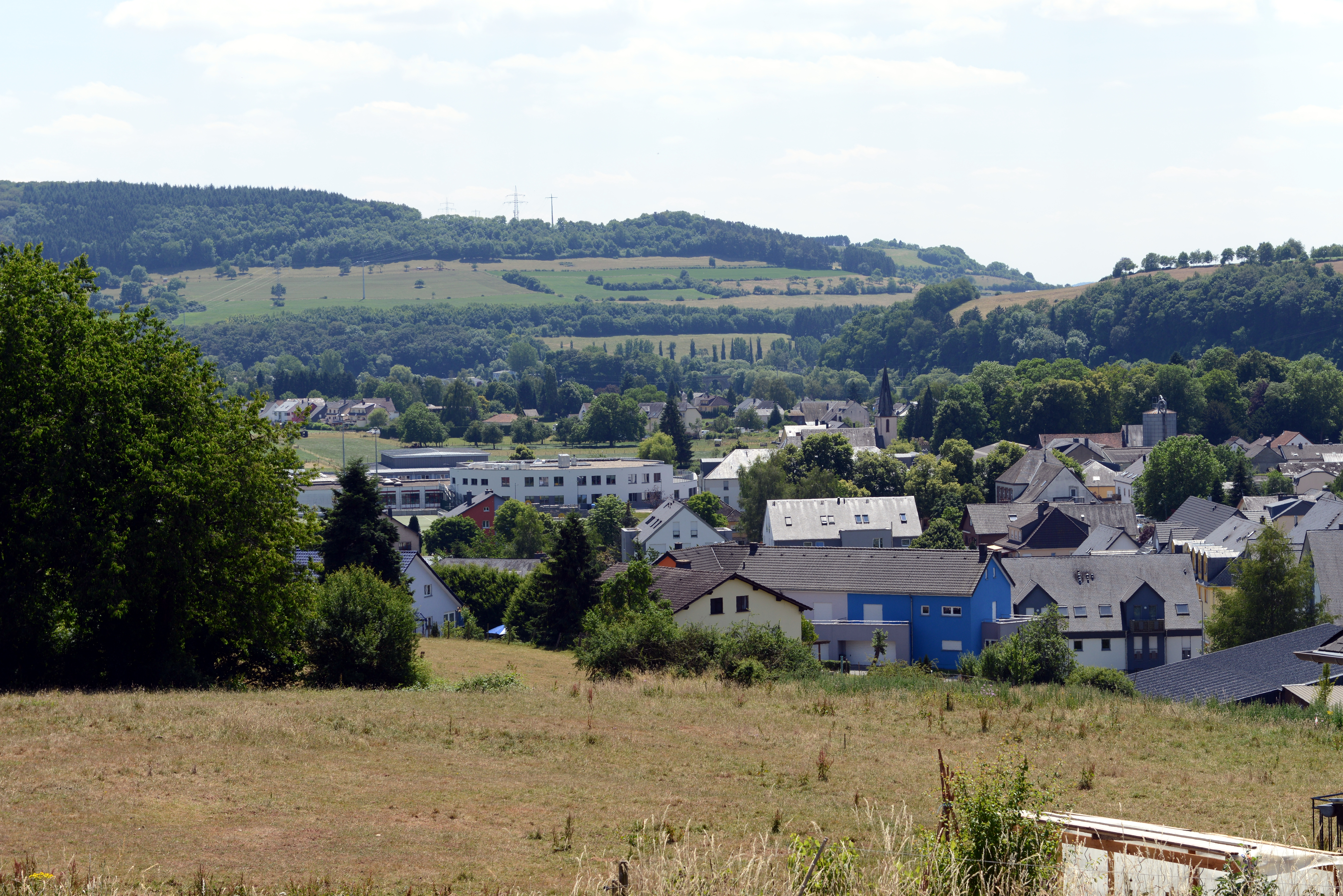 Vue vum Nordosten op Ierpeldeng.